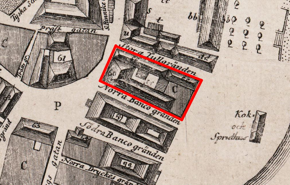 Grundritning över Stockholms stad nr. 1, del visande kv Proserpina